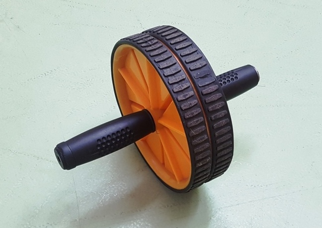 Kółko do ćwiczeń rolka wałek mięśnie brzucha AB wheel ab roller Bauchroller Bauchmuskeltrainer